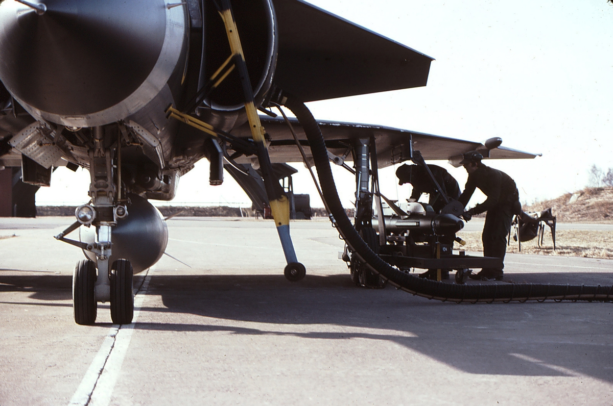 Klargöring av Saab JA37 Viggen inför start, vid F 13 Bråvalla Flygflottilj en övnings RB71 Skyflash har förts fram under vänstervingen. Observera 30mm kanonen under buken som är en tydlig skillnad mellan Jaktviggen och övriga versioner. A JA37 Viggen being armed up with an RB71 Skyflash at F13 Wing Bråvalla the missile has been taken up and under the left wing. Notice the 30mm cannon under the belly of the aircraft that's a clear difference between the Fighter Viggen and the other versions.